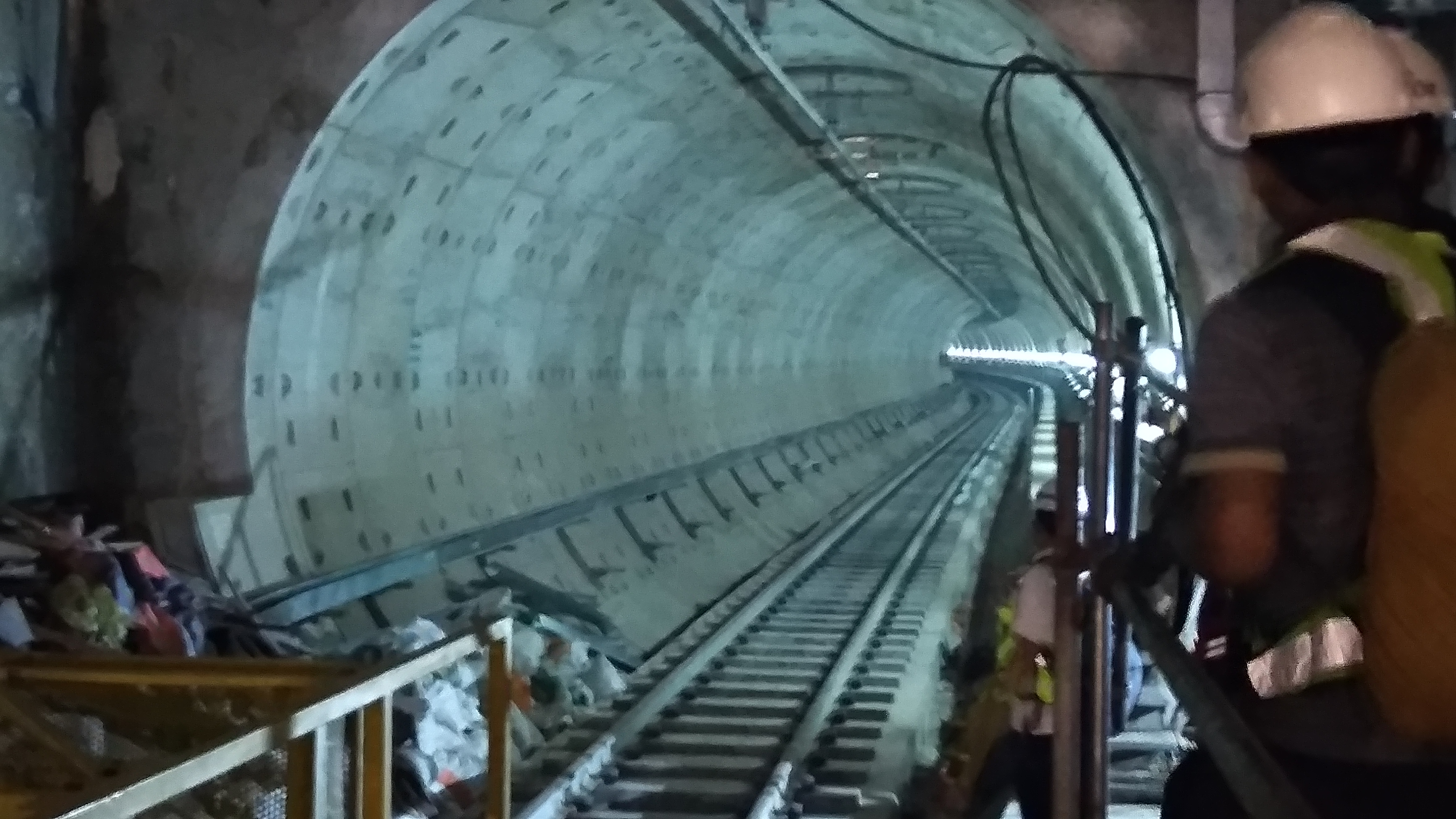 Terowongan antara stasiun Dukuh Atas dan Bundaran HI pada jalur MRT Jakarta